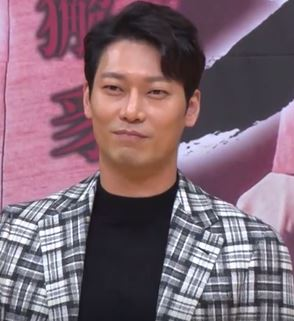 11일 오전 서울 목동SBS에서 SBS 월화드라마 ‘해치’ 제작발표회가 열렸다